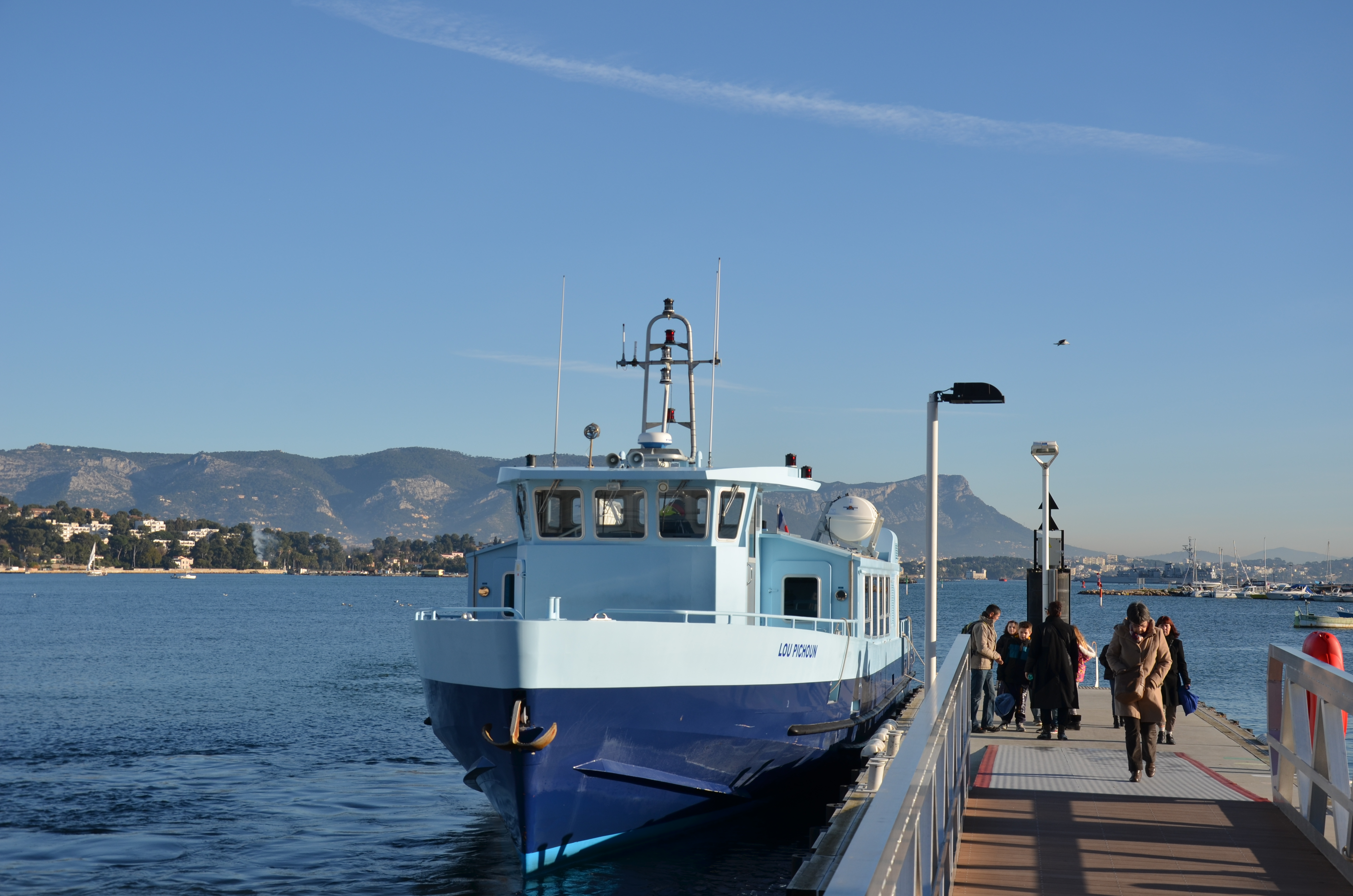 Bateau-Bus "Lou Pichoun" au ponton des Sablettes à La Seyne-sur-Mer, sur la ligne 18M du réseau Mistral.